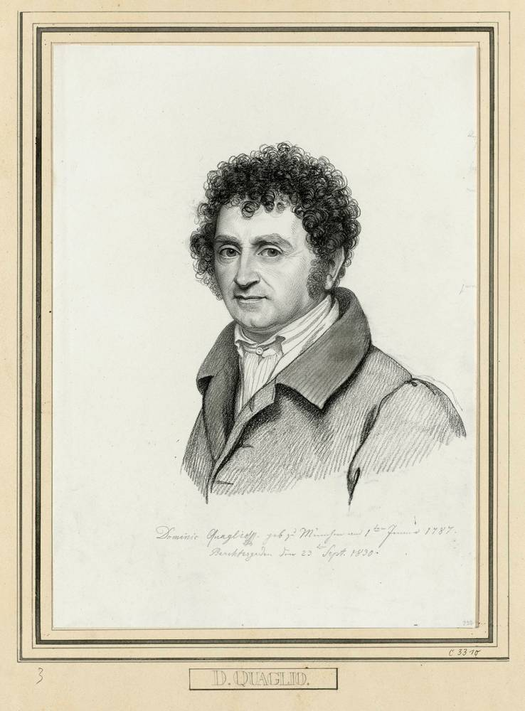 Zeichnung mit dem Portrait Domenico Quaglio - Schwarze Kreide, weiß gehöht - Staatliche Kunstsammlung Dresden 319 x 232 mm (Blatt)